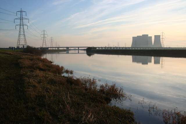 River Trent